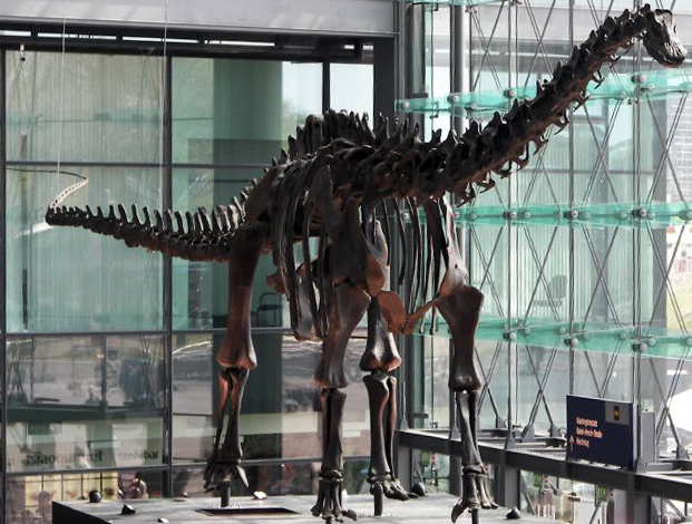 Berlin, Dinosaurier im Hauptbahnhof